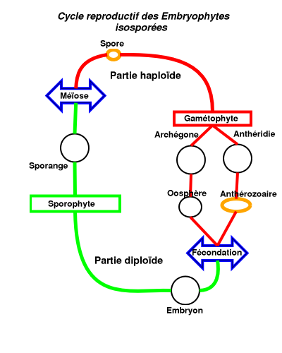 schéma embryophyte isosporée